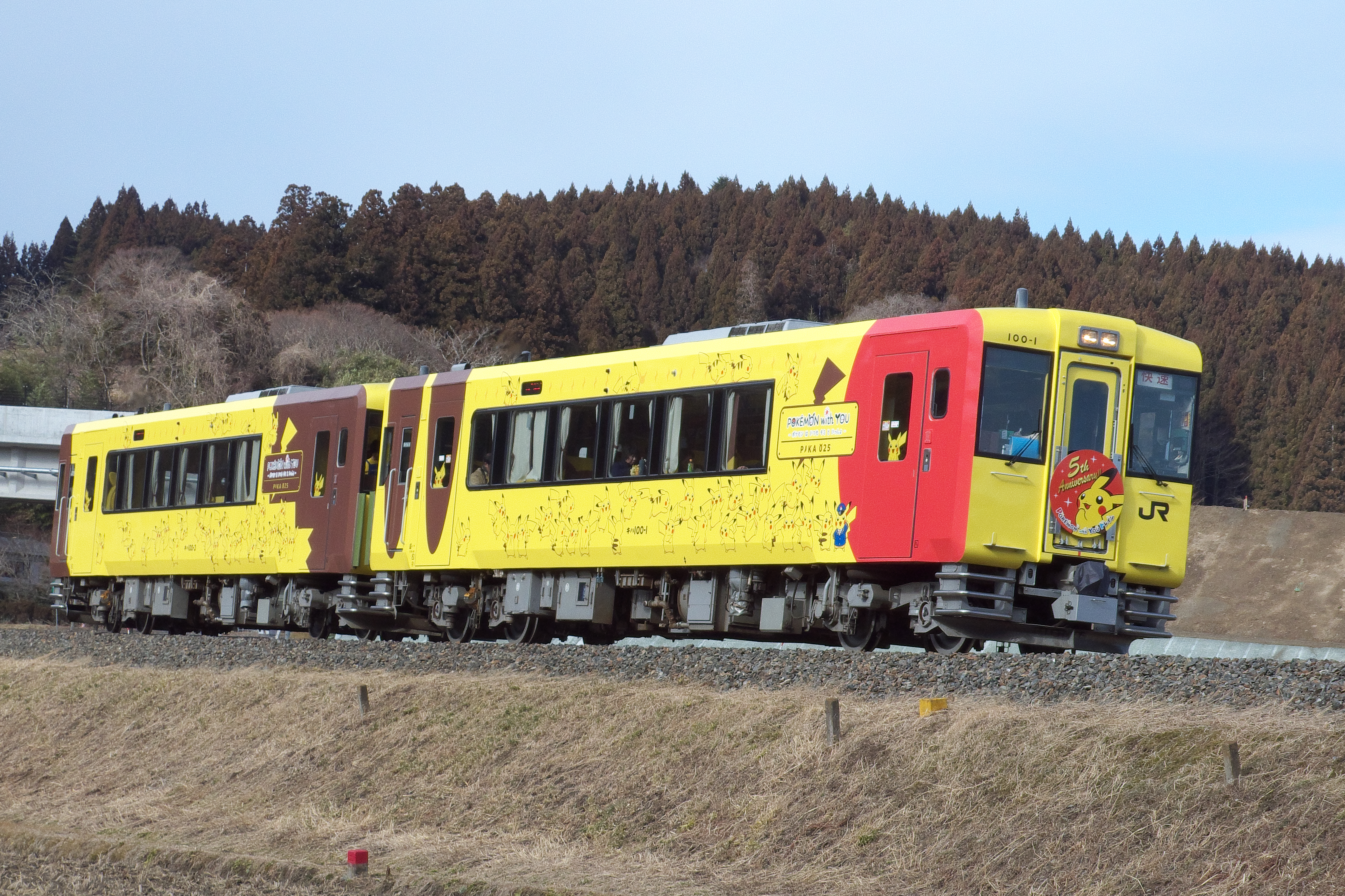 JR東日本キハ100形｢Pokémon with You train(PIKA 025)｣。 大船渡線折壁～新月間にて2018/1/20撮影。